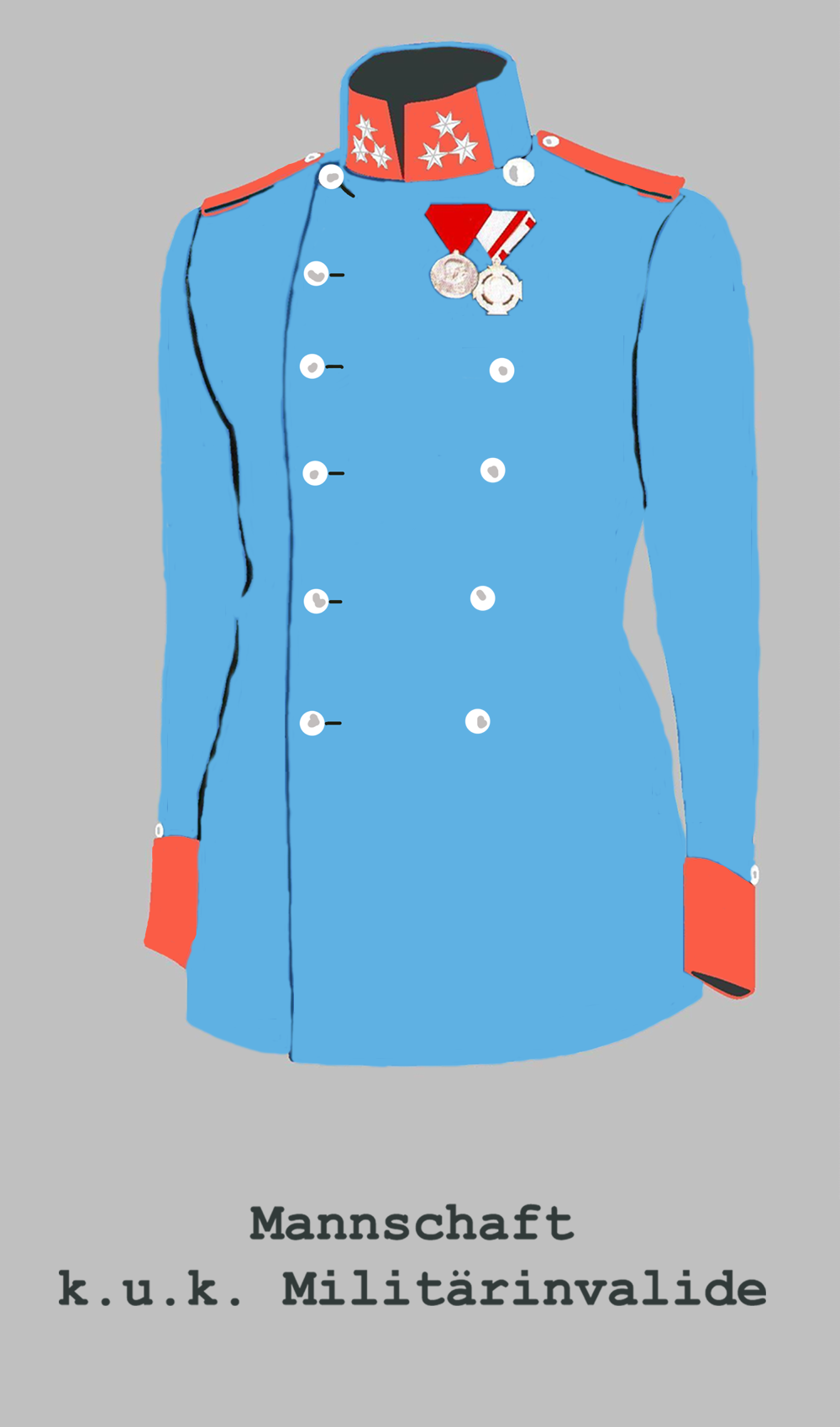 Invalidenzugsführer